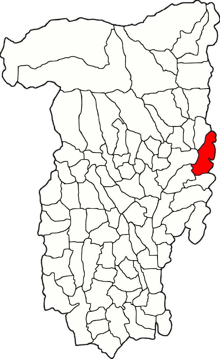 Lage der Gemeinde Golești im Kreis Vâlcea (RO).